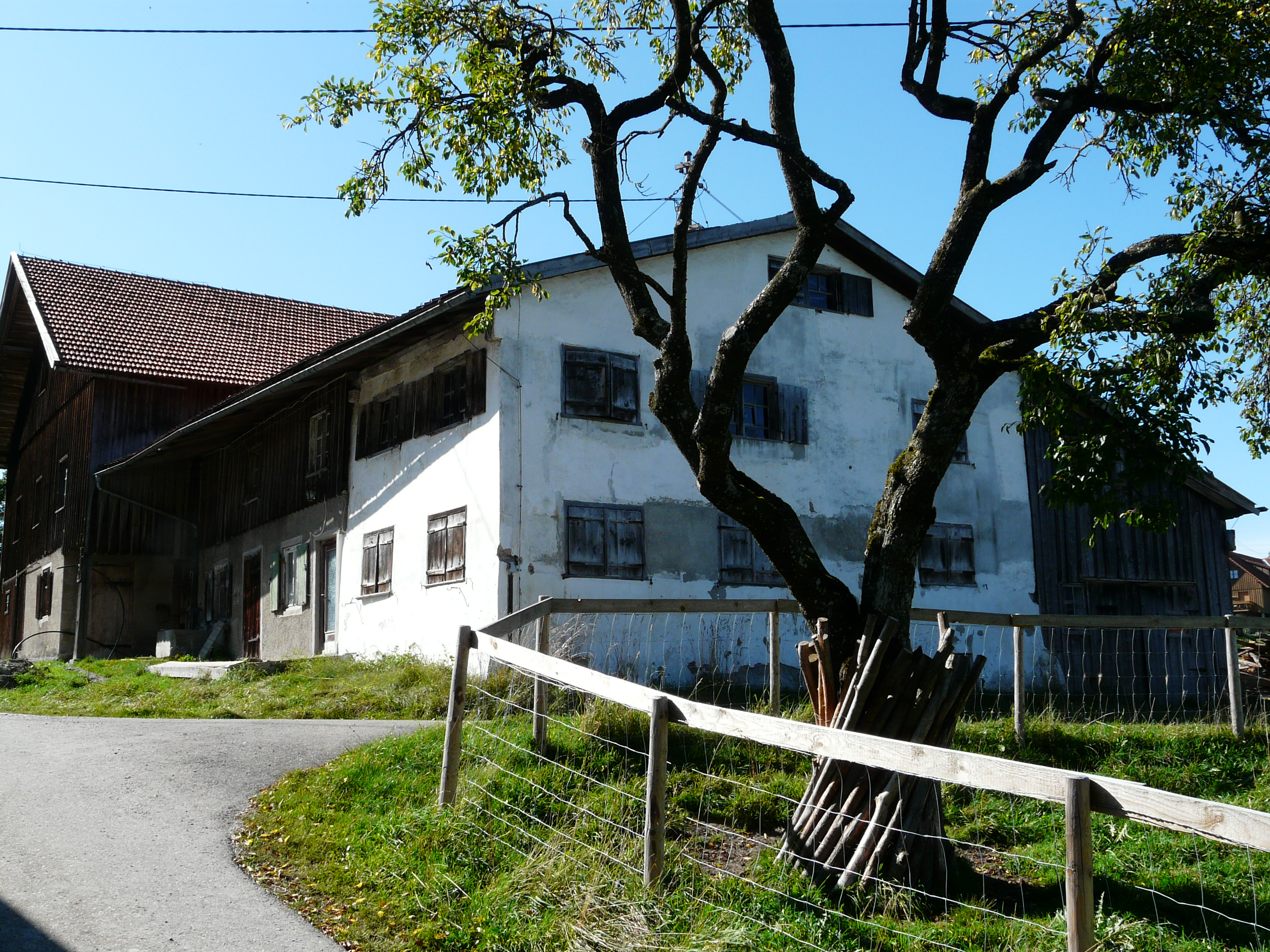 Gablers 181, Buchenberg